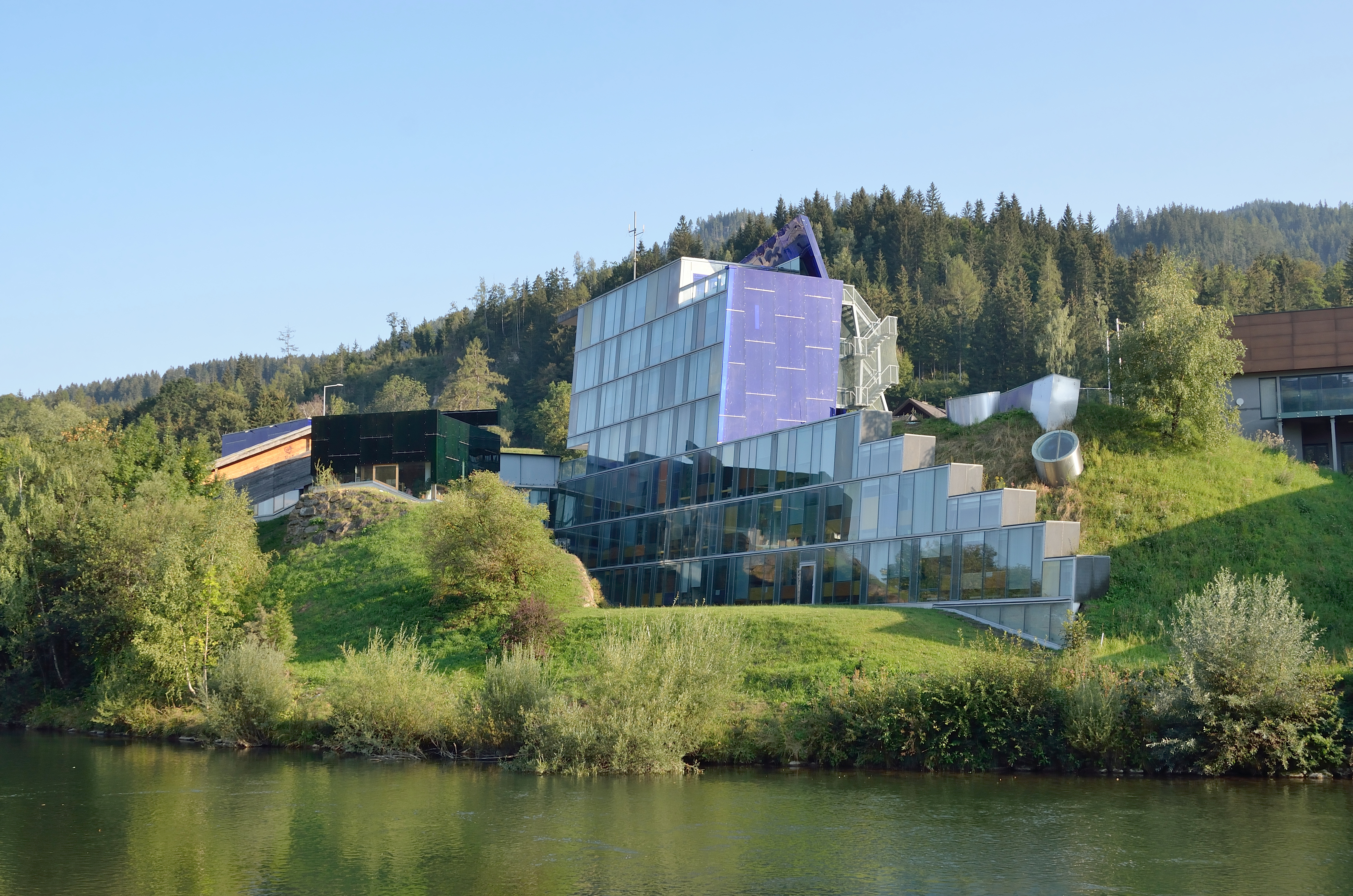 Die Bezirkshauptmannschaft Murau, Steiermark, wurde 2002 nach den Plänen der Architekten Wolfgang Tschapeller und Friedrich W. Schöffauer erbaut. nextroom